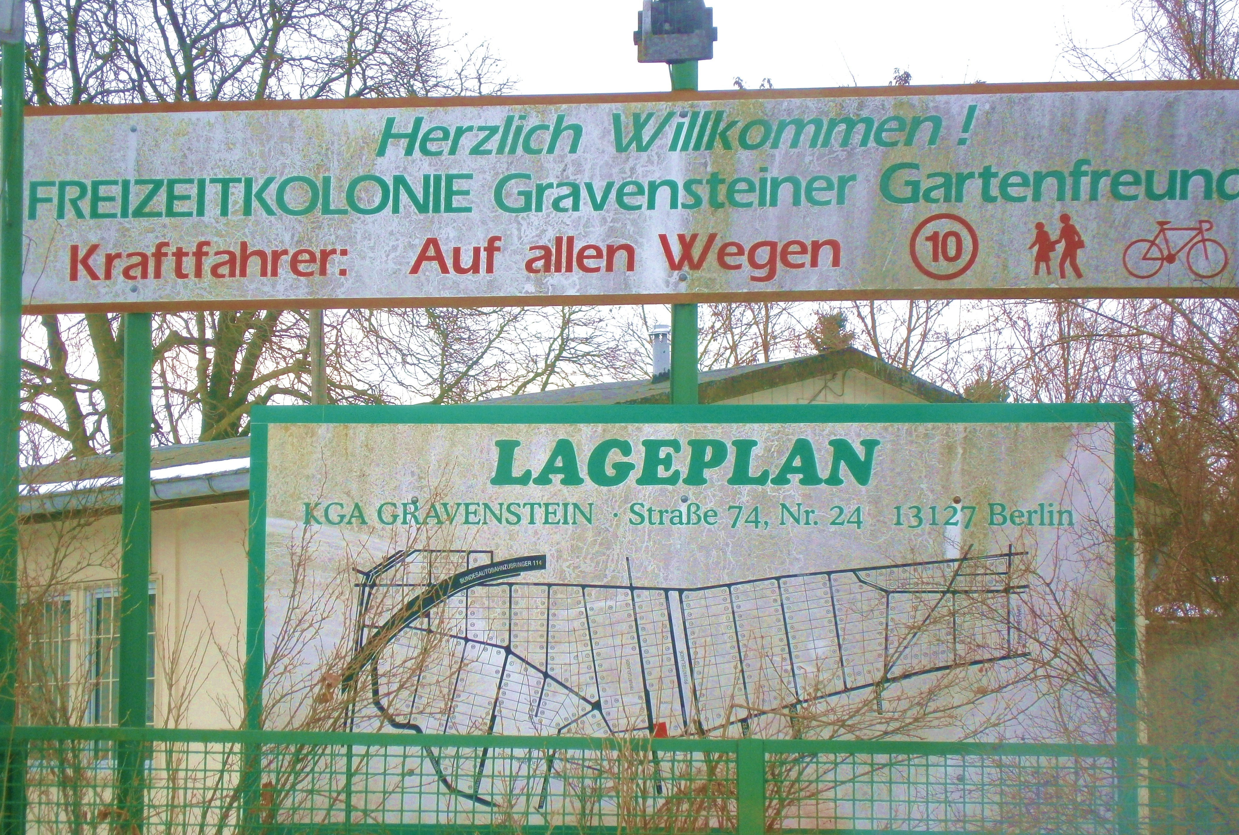 Straße74 ist eine Straße im Ortsteil Berlin-Französisch Buchholz (hier in Blickrichtung: KGA Gravenstein)